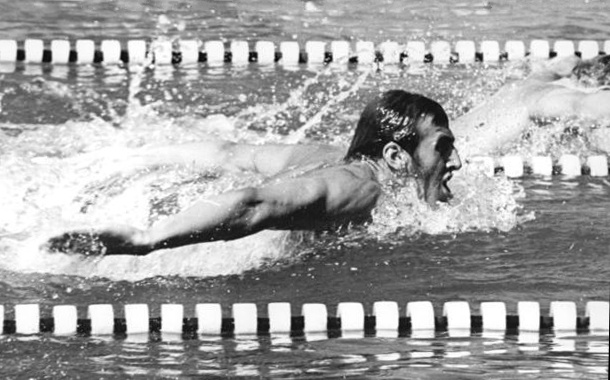 Bertram Türpe ADN-ZB Mittelstädt 8-7-71-Rostock:XXIV. DDR-Meisterschaften im Sportschwimmen (1.Tag)-Neuer DDR-Meister über 400 m Lagen der Herren wurde Bertram Türpe (SC DHfK Leipzig) in 4:48,3 min-Hier auf der Delphin-Strecke.